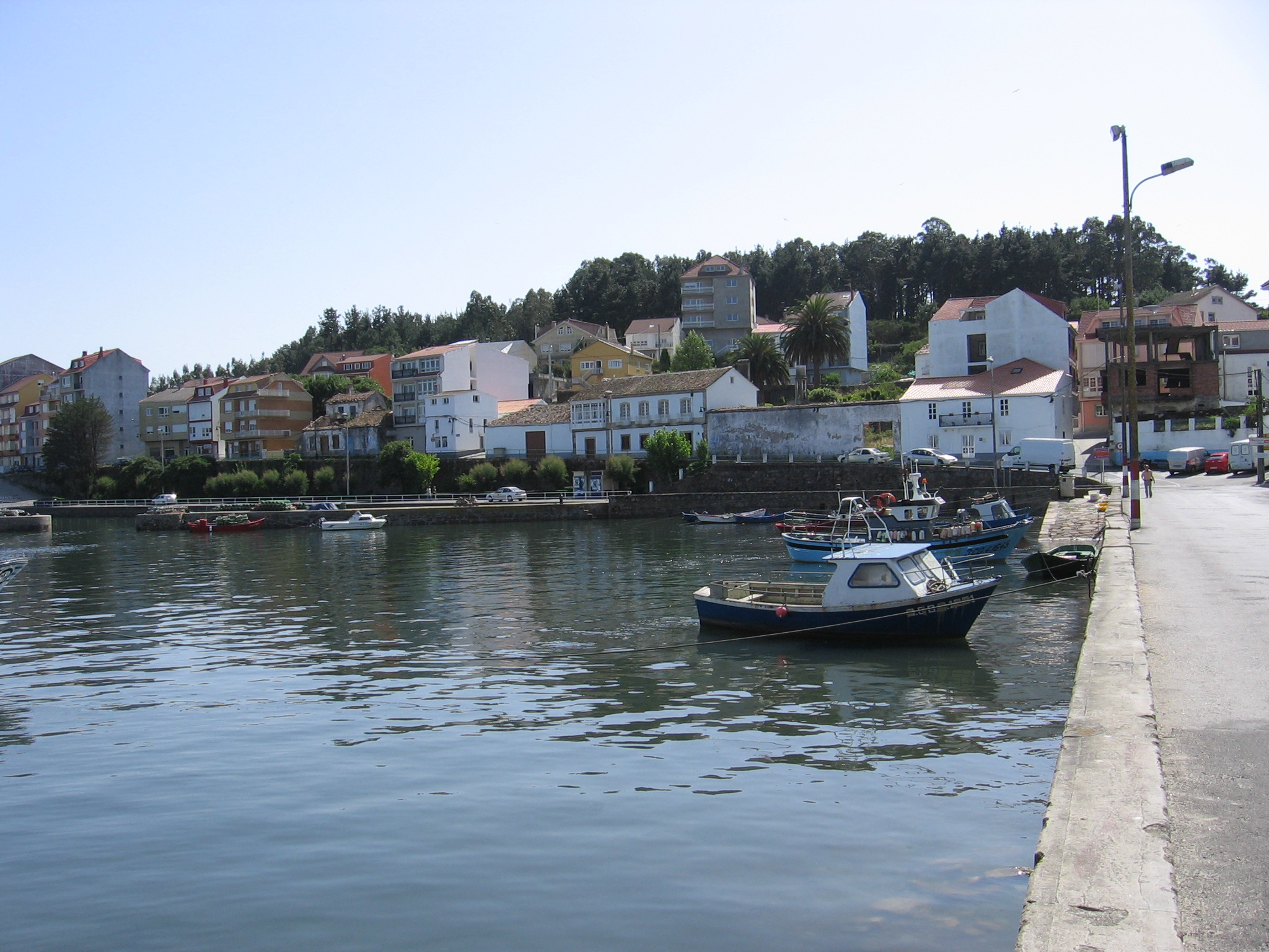 Camariñas, provincia da Coruña, Galiza